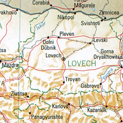 Lowetsch - Lage des Ortes in Bulgarien